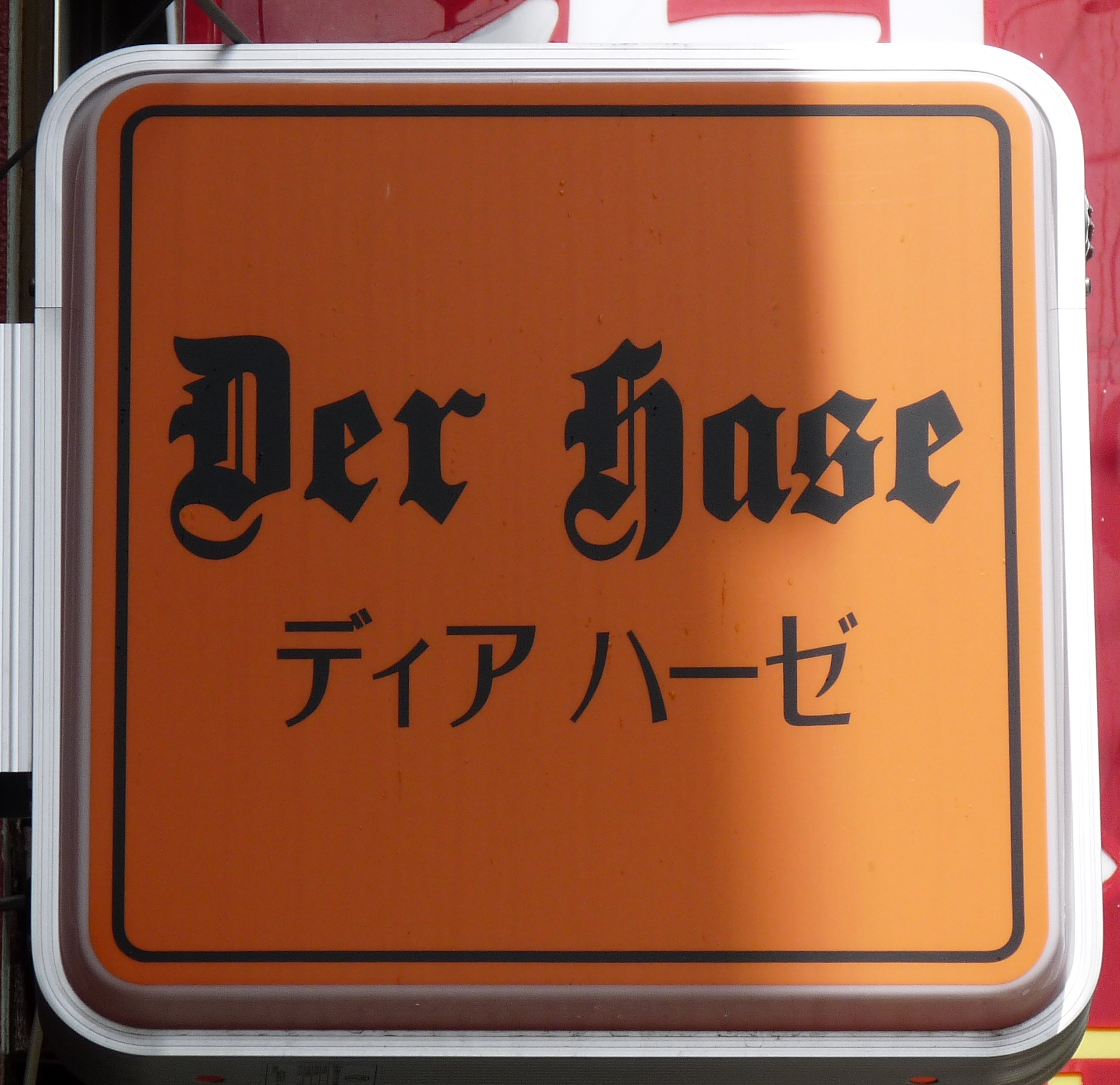 Schild, gesehen in Kōbe (Japan). Seine Gestaltung erinnert an eine deutsche Ortstafel, es ist aber fast quadratisch. Zu lesen ist der deutsche Text „Der Hase“ in einer gebrochenen Schrift mit Transkription „ディア ハーゼ“ in japanischer Katakana.